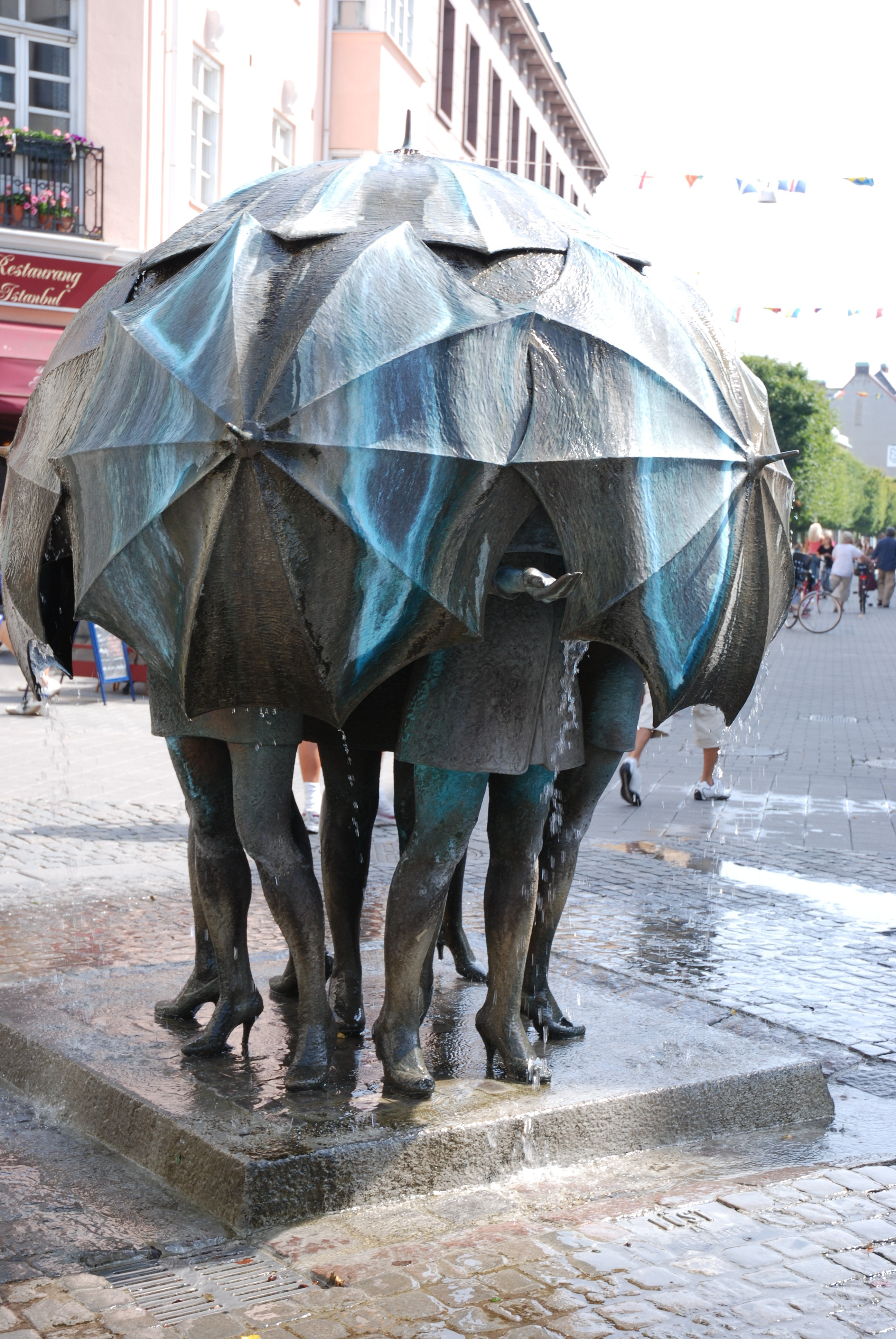 Fred Åberg's Böst (1996), bronze, Trelleborg, Sweden.